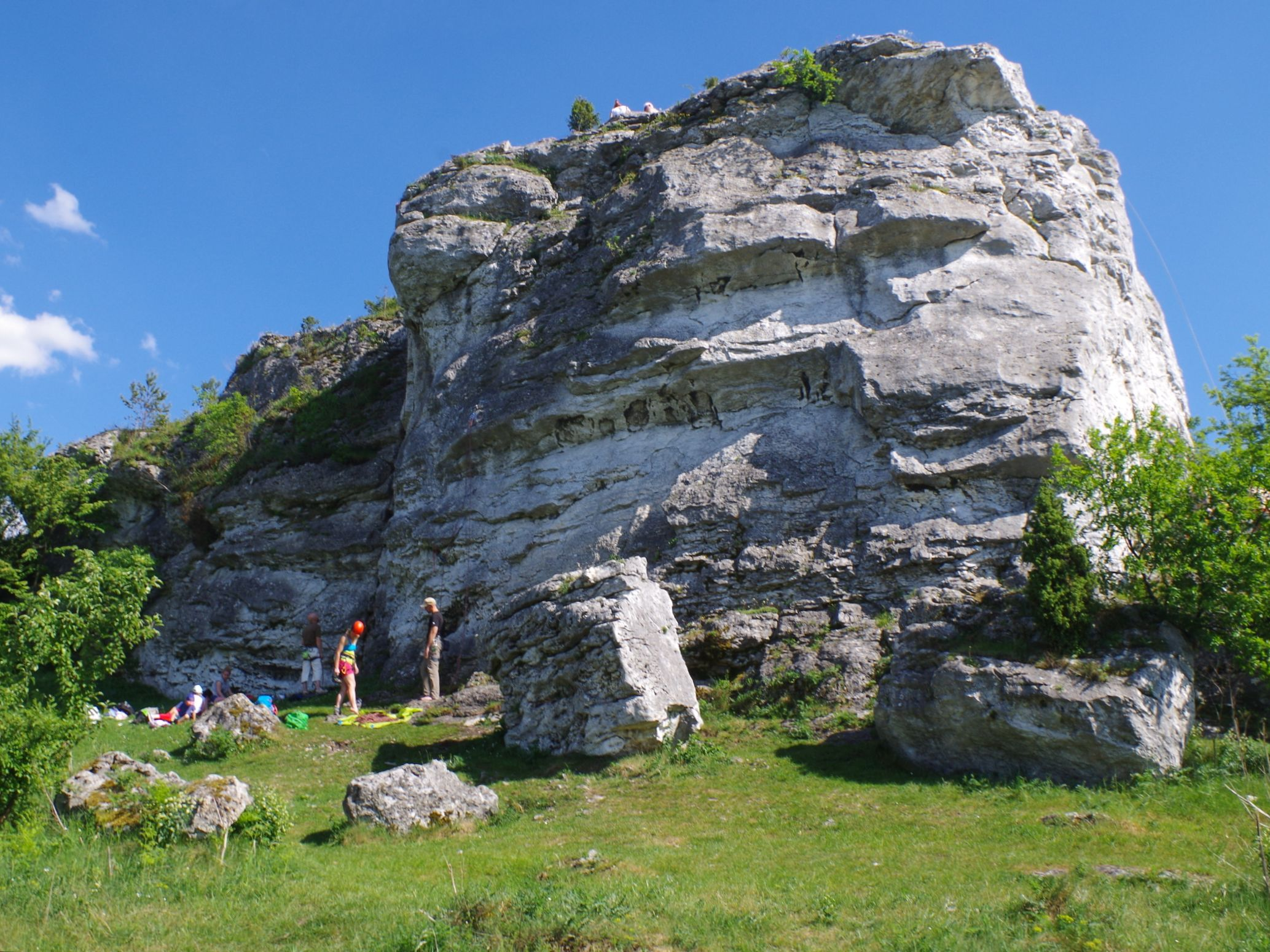 Skała Biblioteka w Grupie Dziewicy na wzgórzu Cegielnia koło Olsztyna